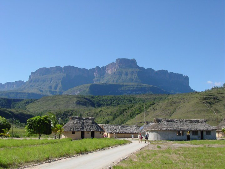 anamecer en kavack